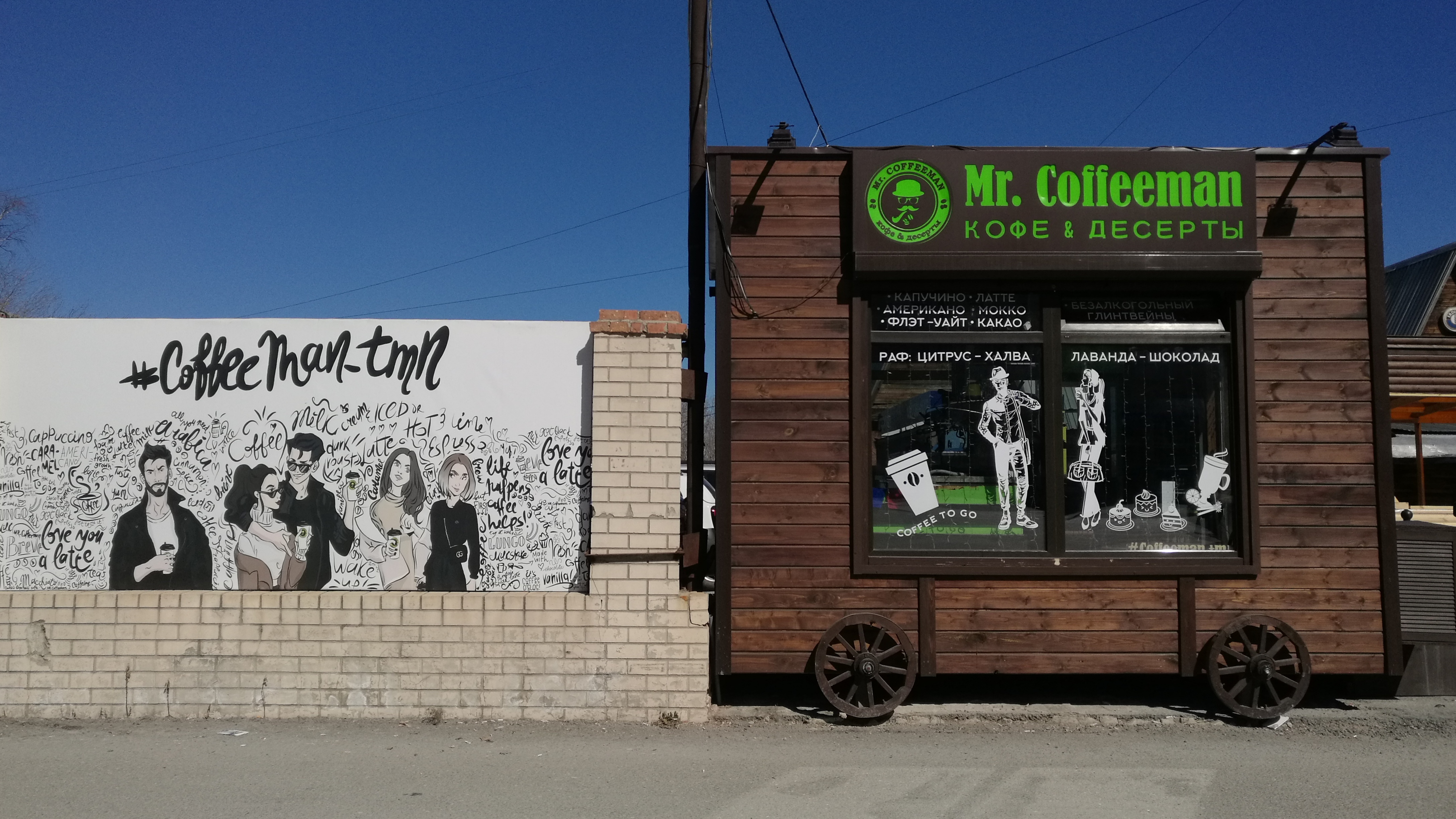 Kafobudo en strato Respubliko. Tjumeno, Rusio.